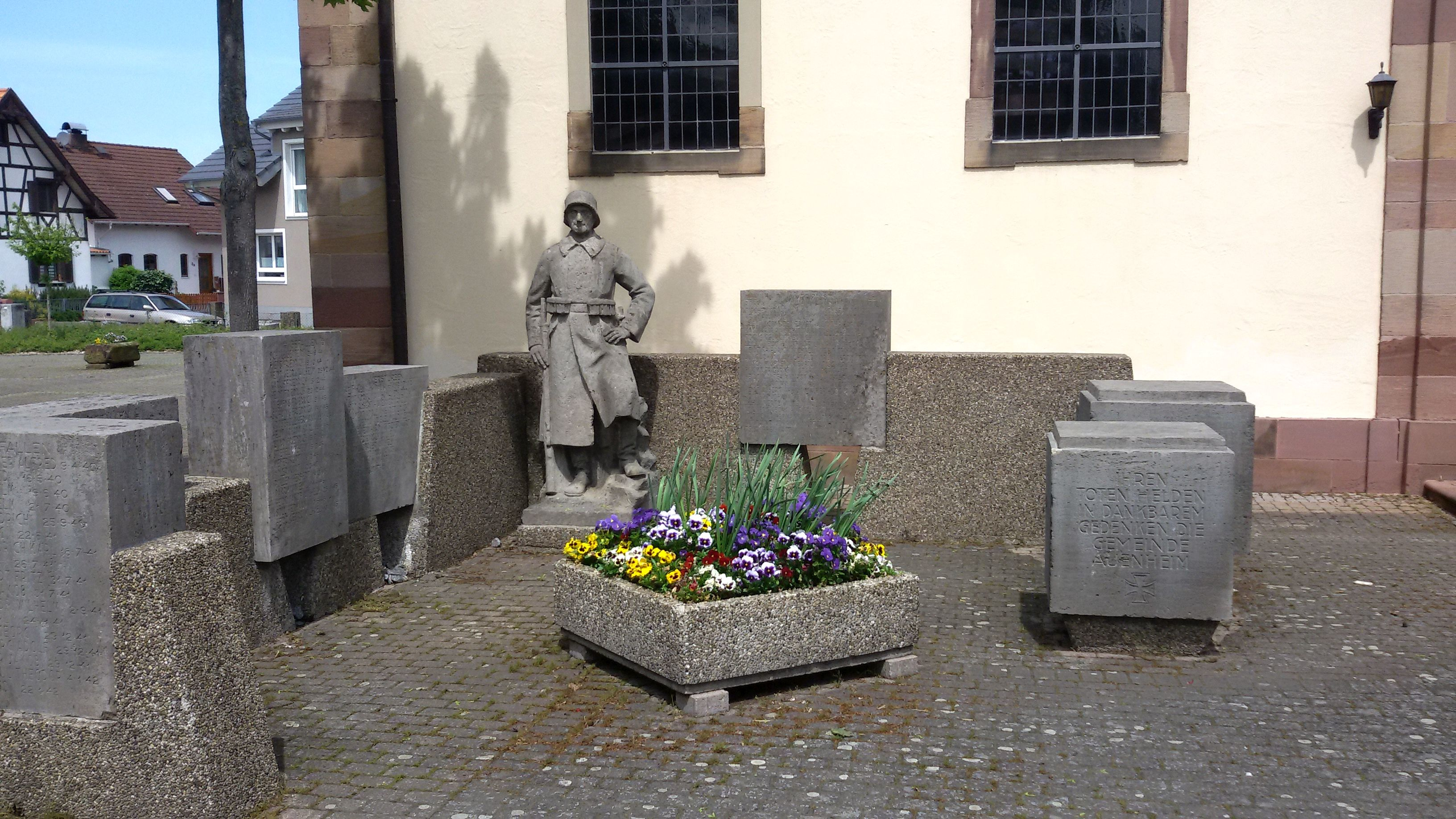 Denkmal vor der Kirche